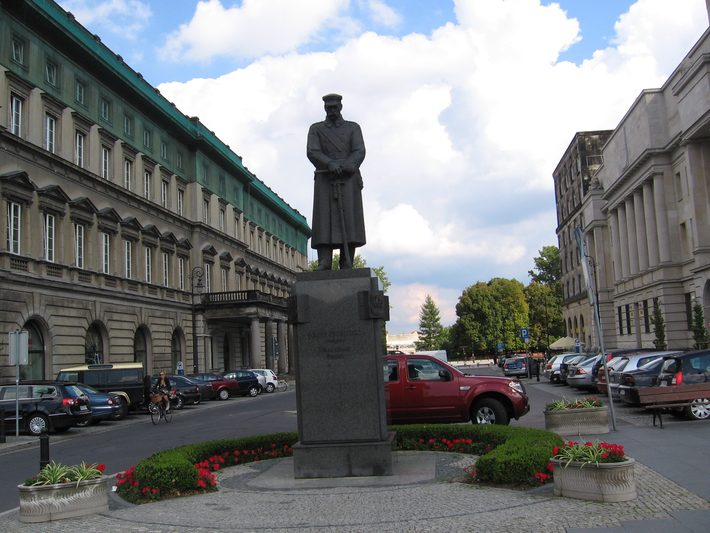 Фото